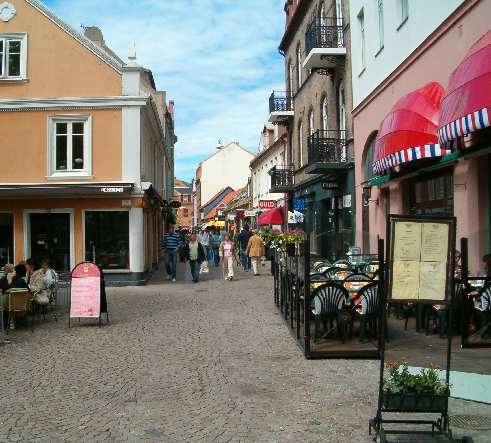 Bruksgatan, shopping street in Helsingborg, Sweden.